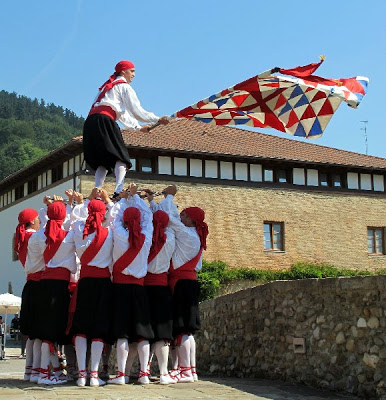 Aurtzaka taldeko dantzariak, Igartzako zubian (Beasain) dantzan, atzean Dolarea dutela.